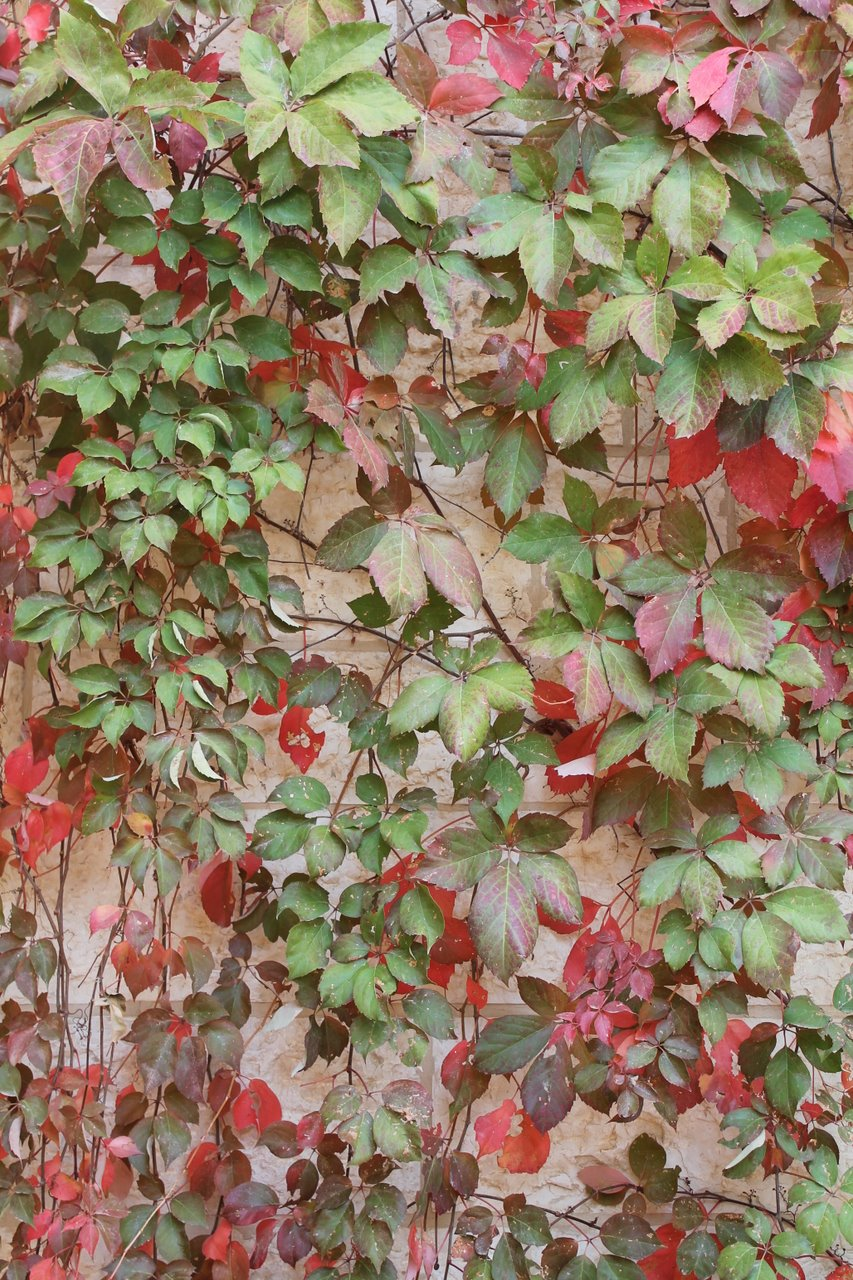 קיסוסן כמטפס